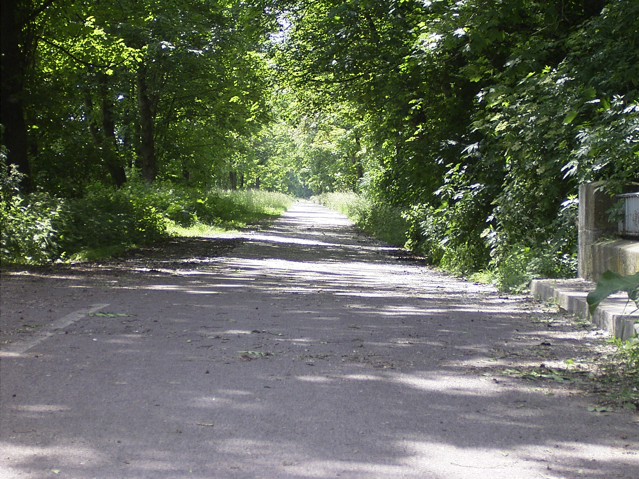 Denkmal Theurer Christian Radegast Anhalt